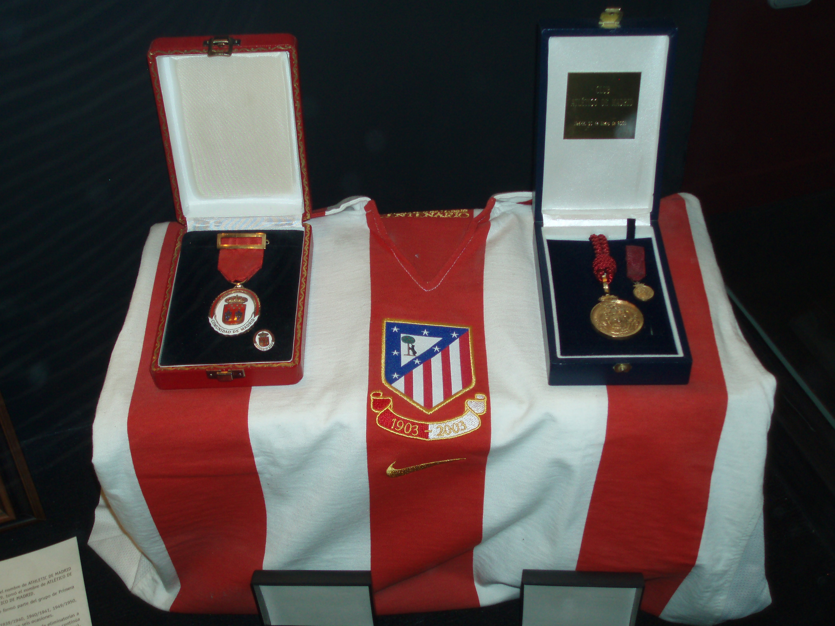 Camiseta y medallas por el centenario del Atlético de Madrid (1903-2003)